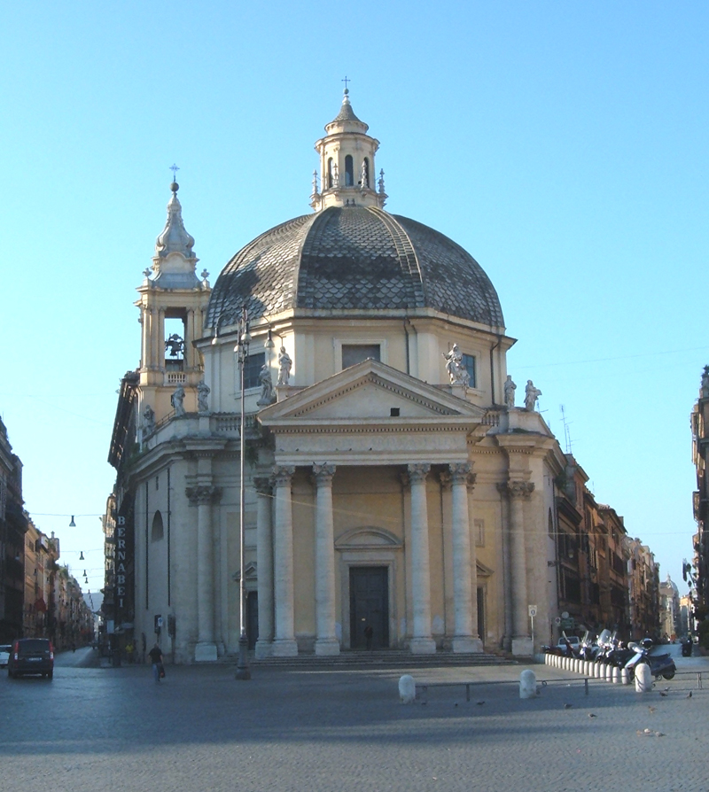 Chiesa di Santa Maria dei Miracoli, a Roma, nel rione Campo Marzio. Foto personale.